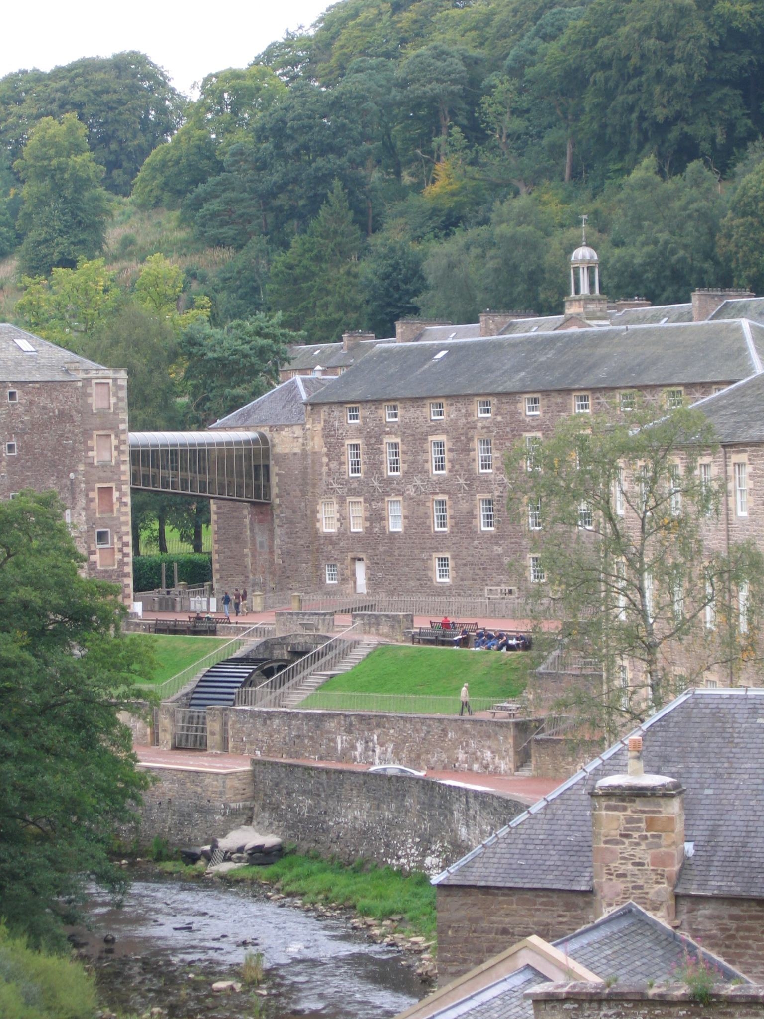 New Lanark View